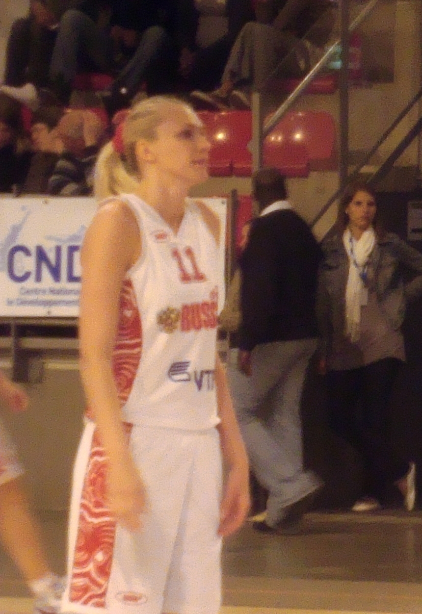 La basketteuse russe Maria Stepanova